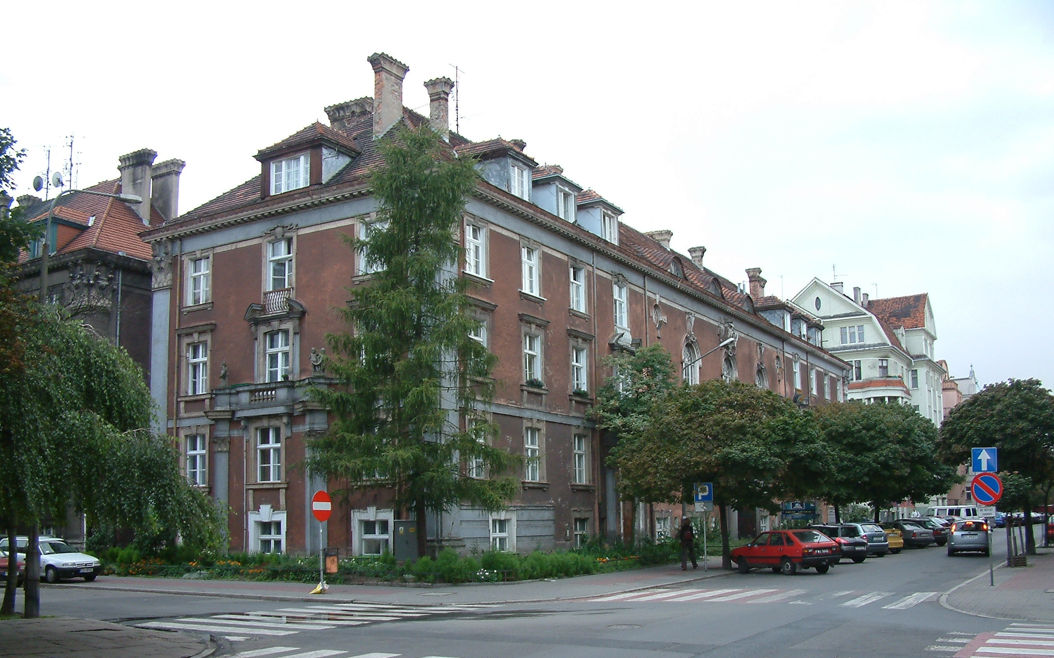 Dom Tramwajarza ("House of Tram worker") in Poznań